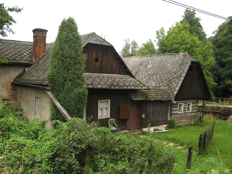 Usedlost čp. 57, Rybník 57, Rybník (okres Ústí nad Orlicí).